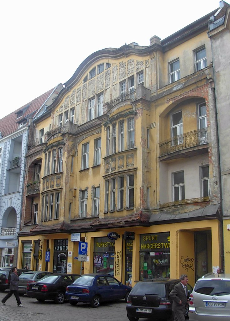 Kamienica ul. Dworcowa 47 w Bydgoszczy